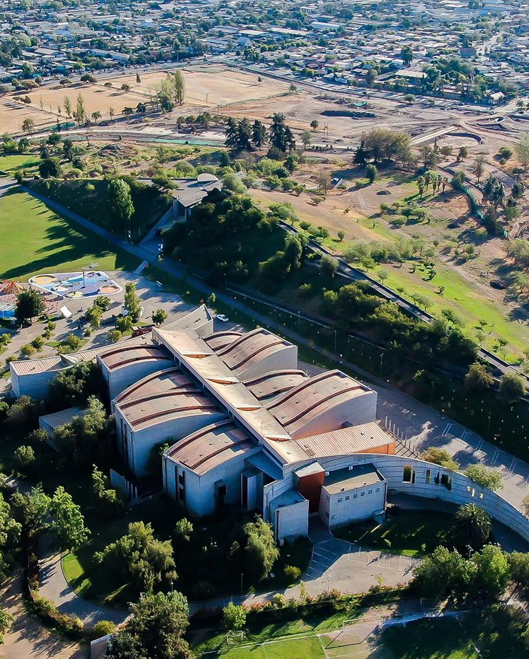 Museo Interactivo Mirador